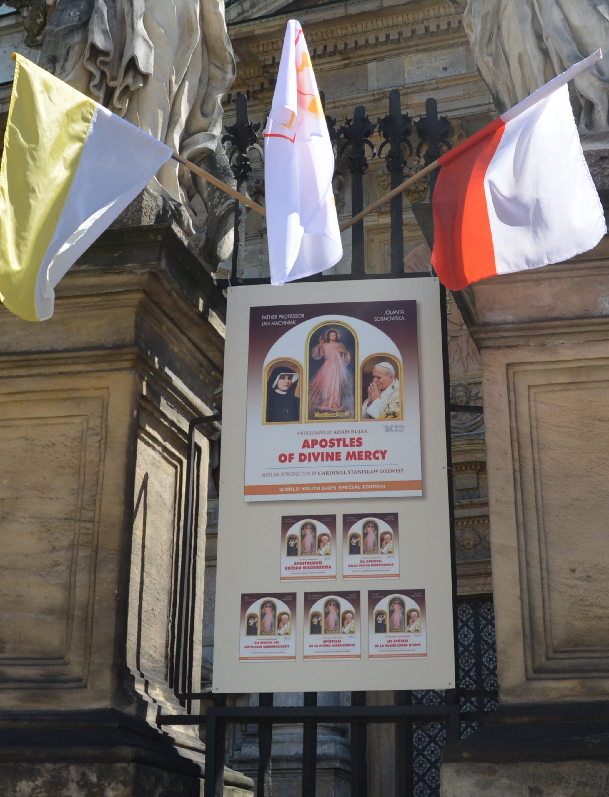 Die Apostolen der Göttlichen Barmherzigkeit